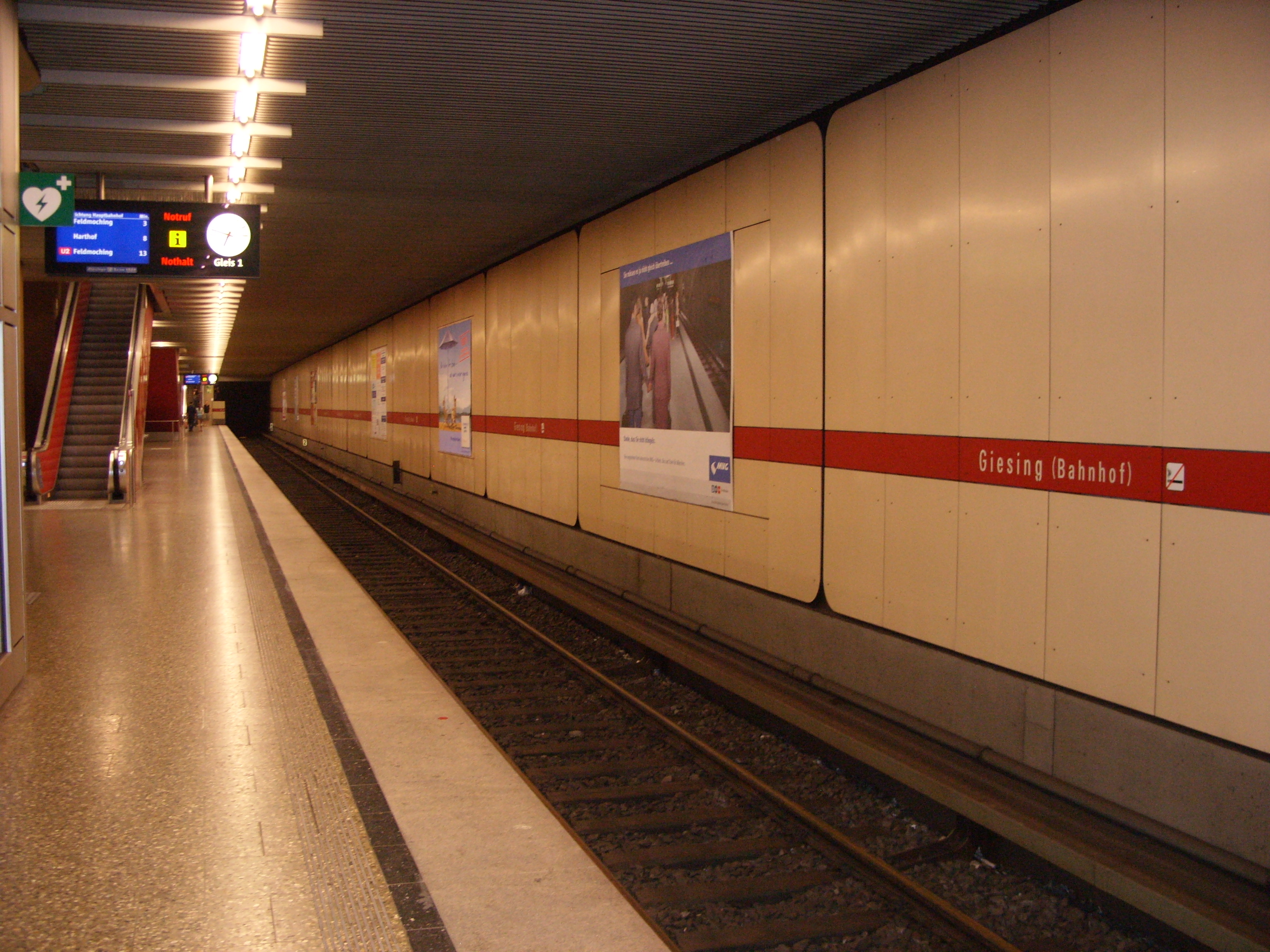 U-Bahnhaltestelle Giesing